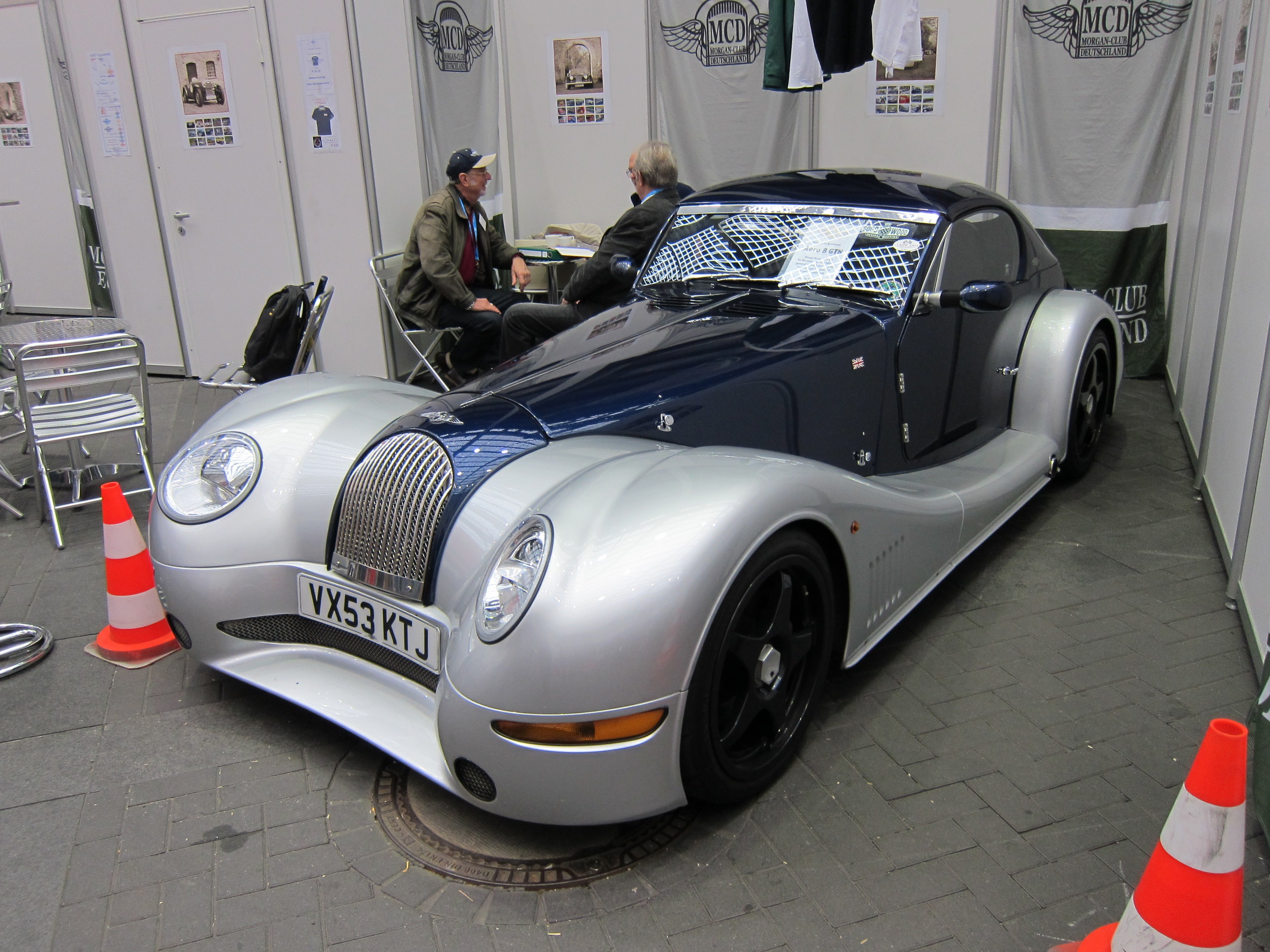 Techno Classica 2011